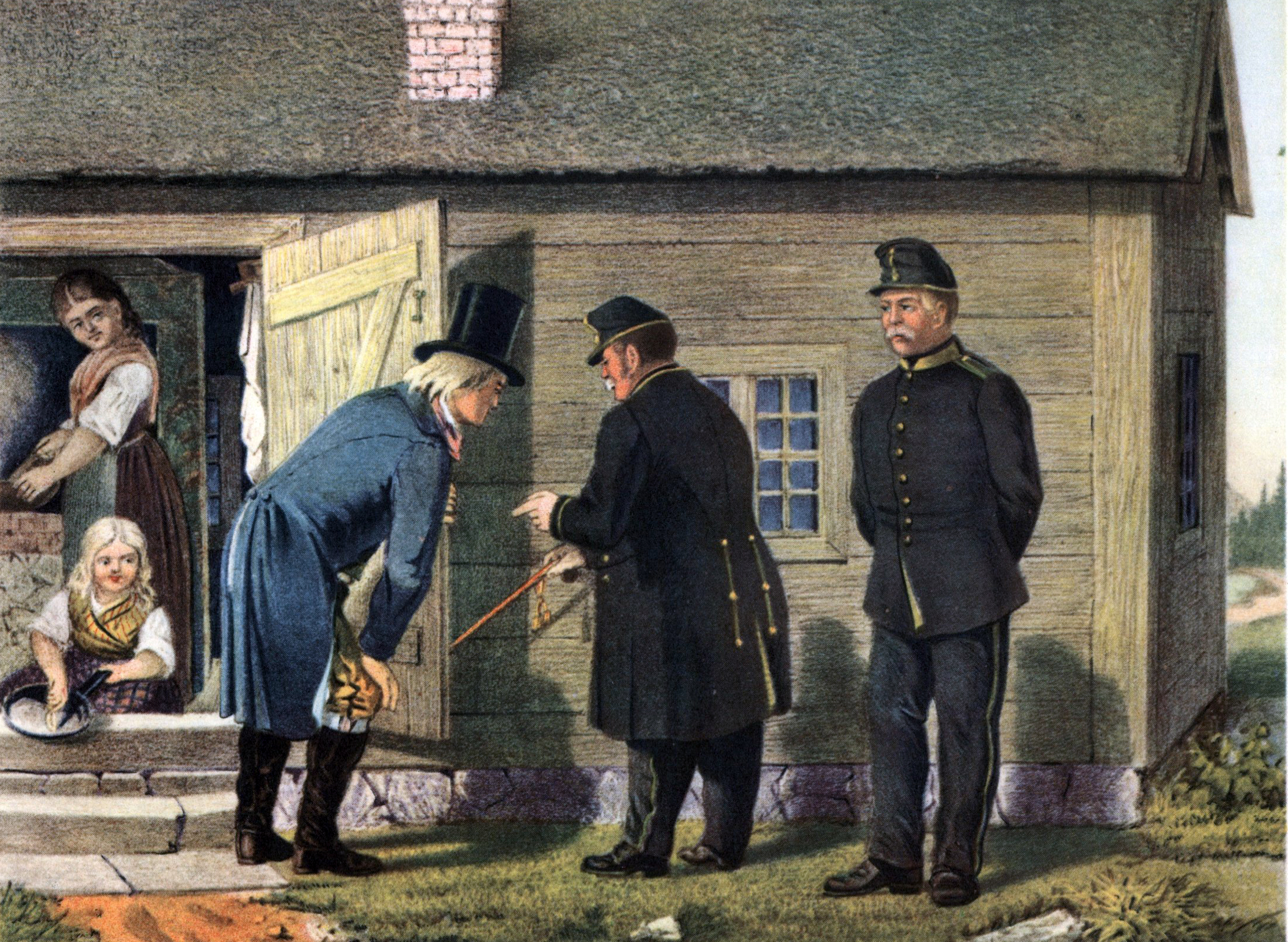 Torpbesiktning. Färglitografi av Viktor Ludvig Emmanuel Sparre ur »Scener ur indelta soldatens lif tecknade af V. L. E. Sparre, text af G. Nyblaeus» (1866).